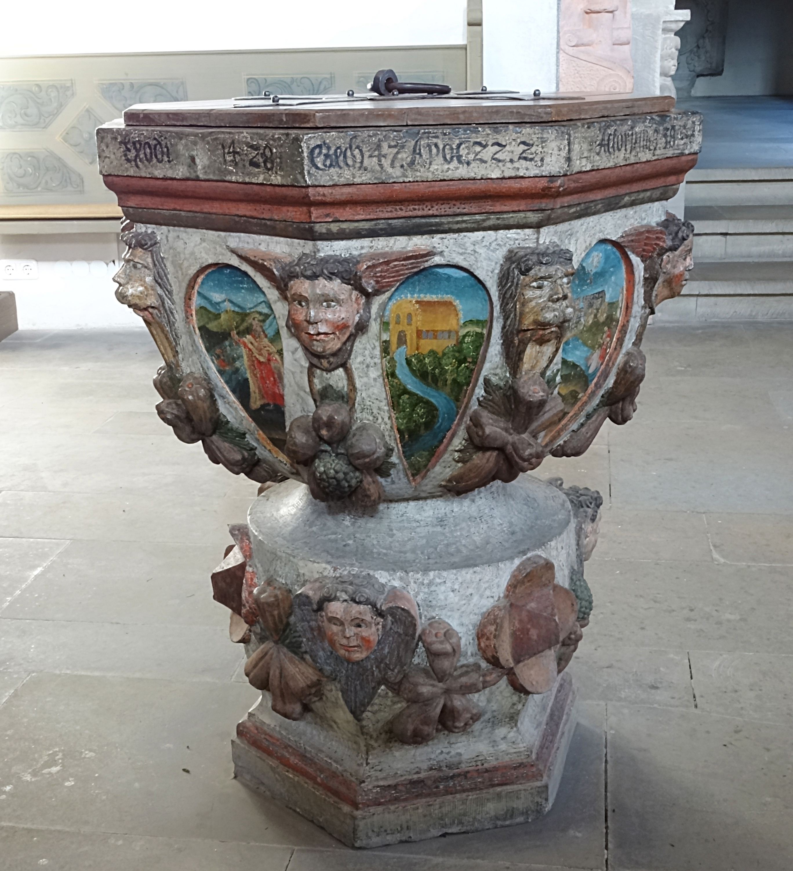 Taufstein von Hans Grüler mit Wasser-Szenen aus dem Alten Testament - symbolhaft für die Taufe - in der Stadtkirche St. Michael, Ostheim vor der Rhön